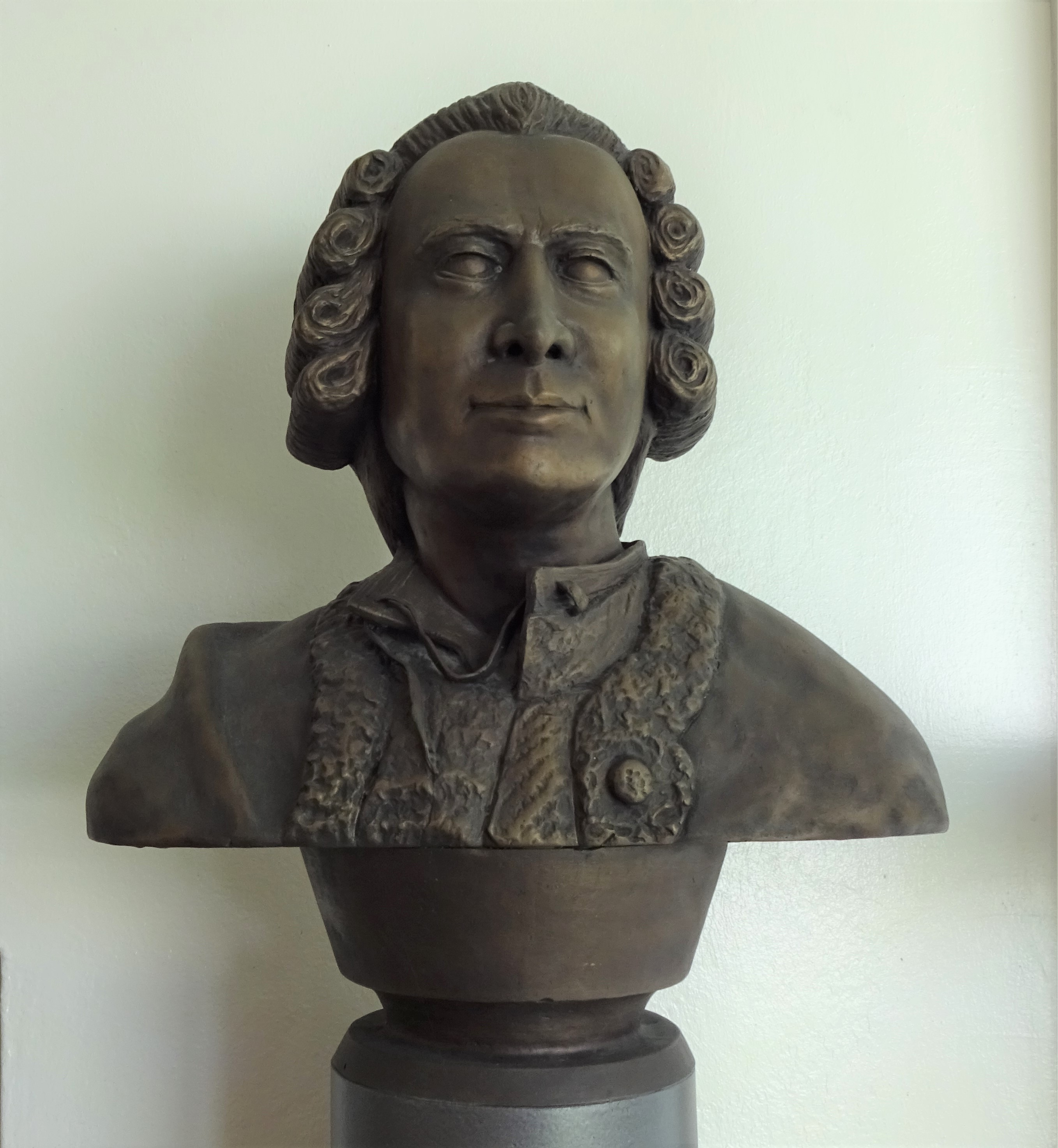 Büste des Philipp Pfaff, königlich preußischer Hofzahnarzt, in der Charité, Institut für Zahn- Mund- und Kieferheilkunde, Aßmannshauser Str. 4-6